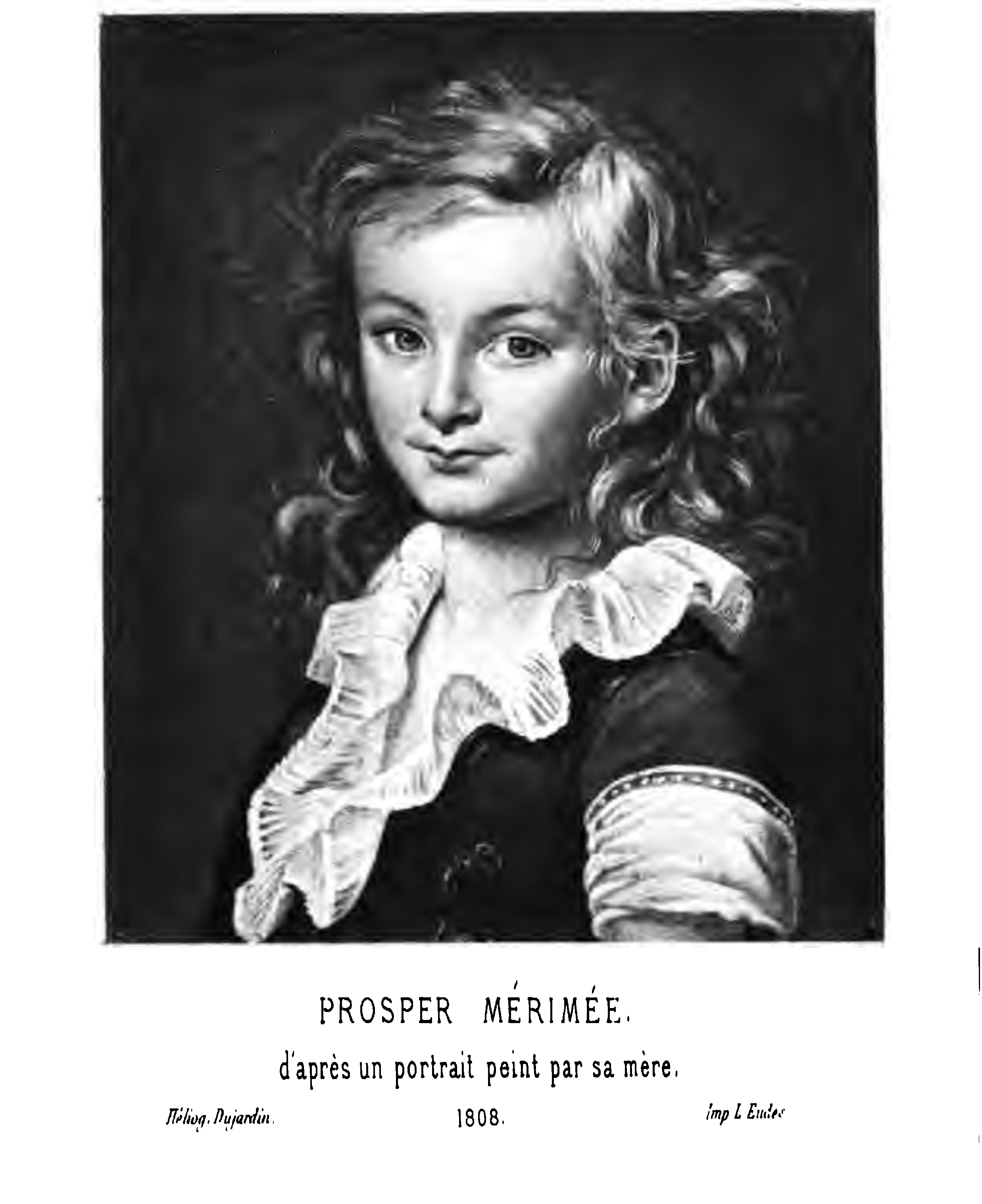 Mérimée,_à_5_ans, peint par sa mère